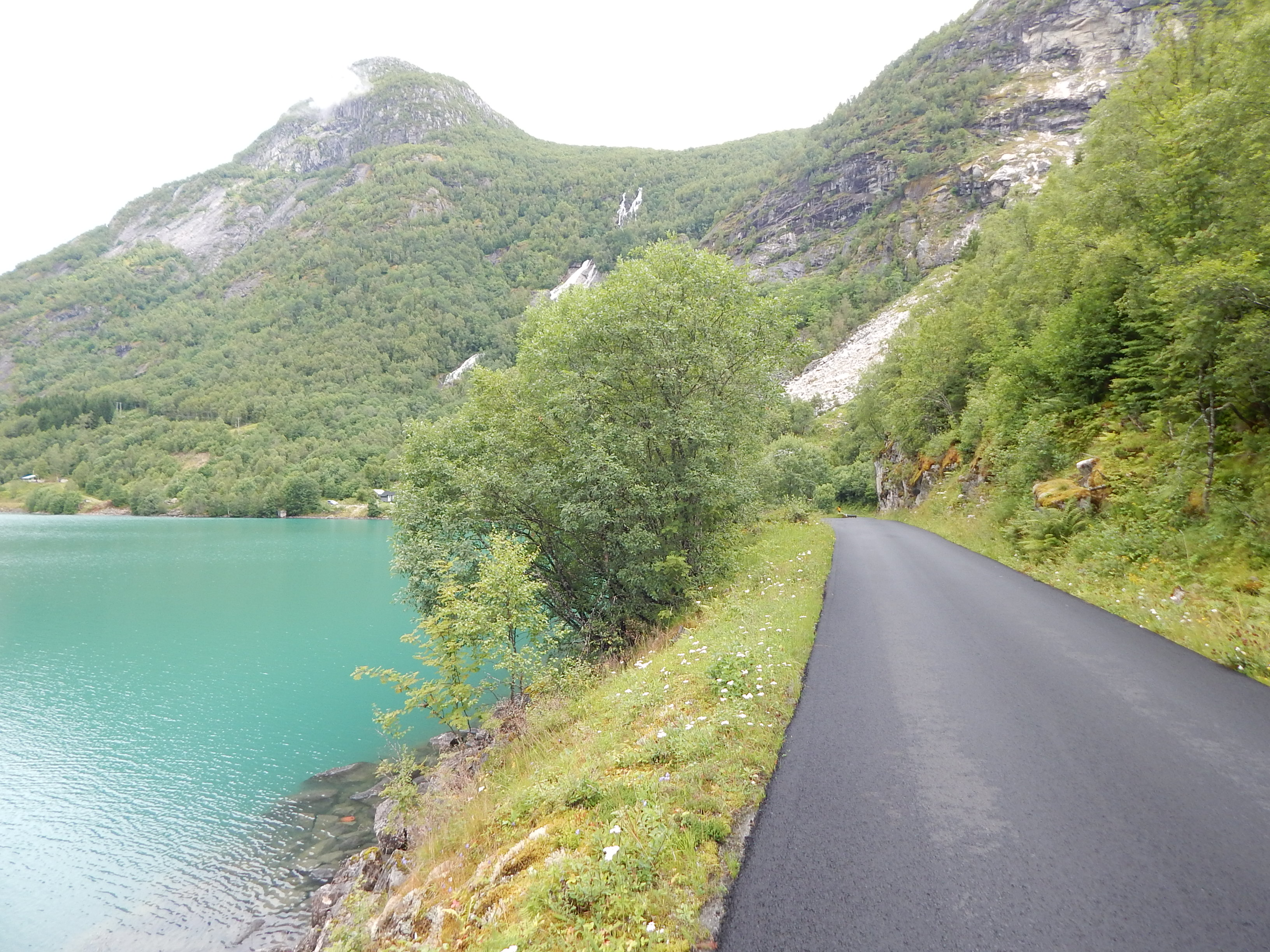 Fylkesvei 337 langs Veitastrondsvatnet